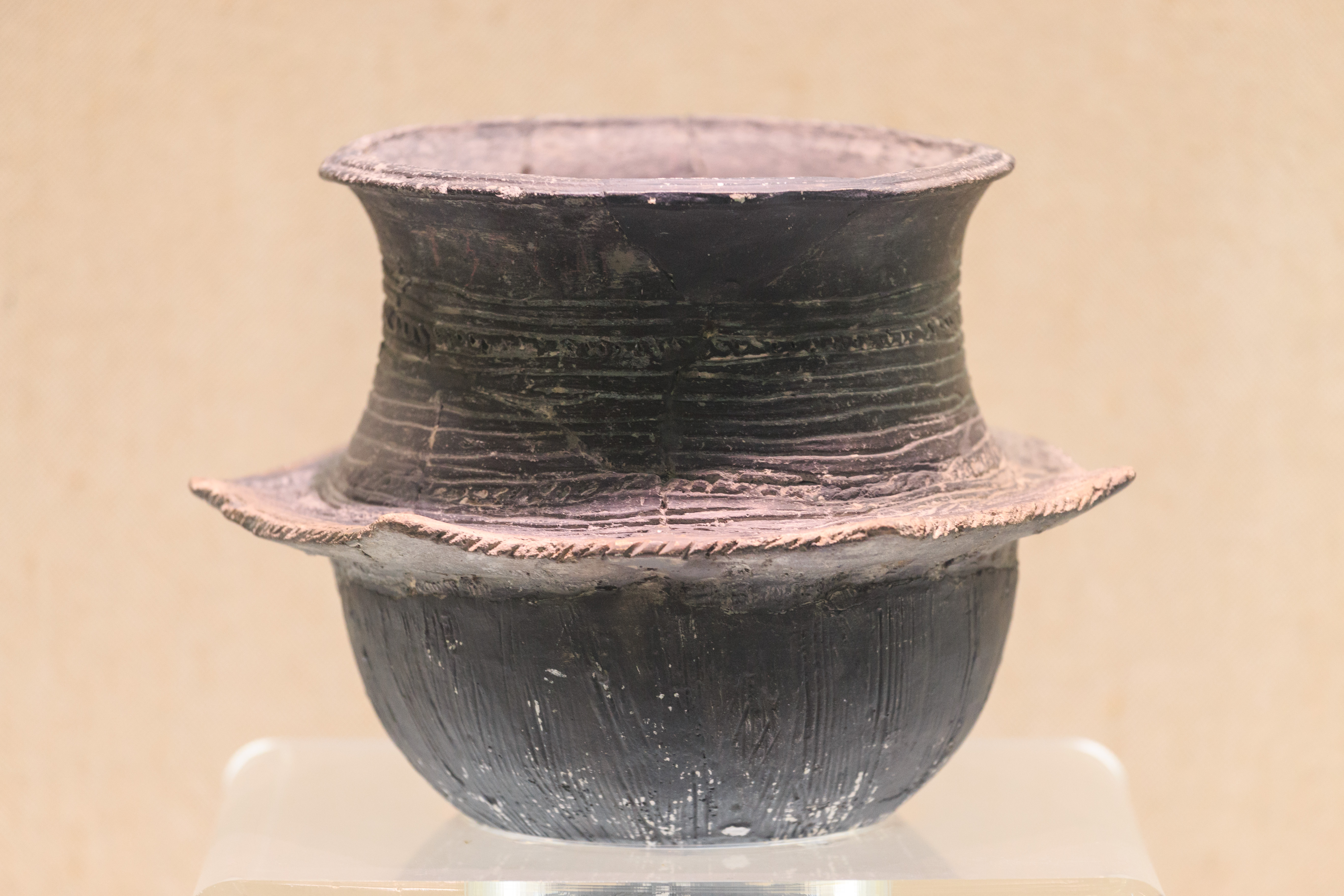 浙江省博物馆孤山馆区—— 黑陶釜，河姆渡遗址出土